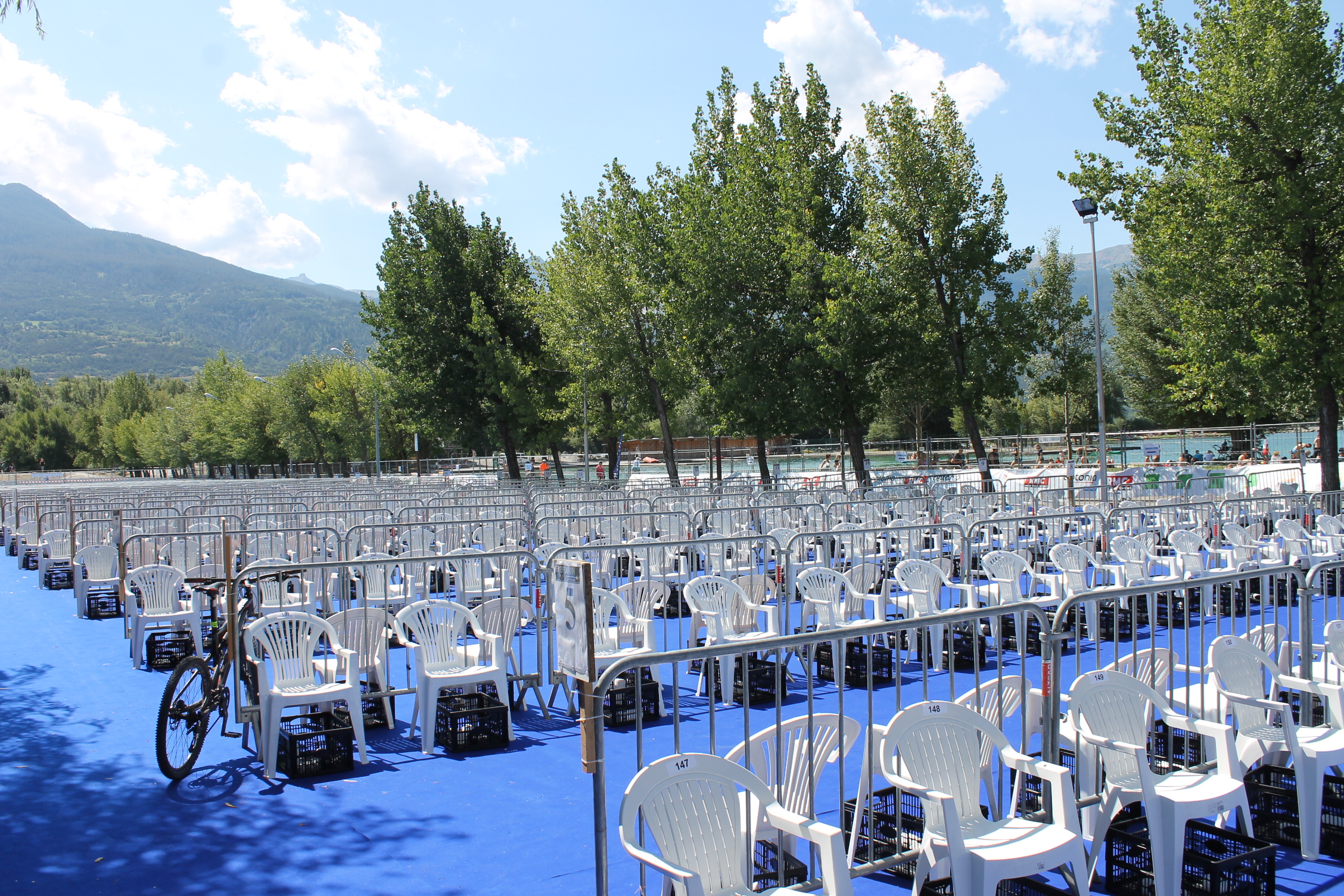 Aire de transition de l'Embrunman en 2017